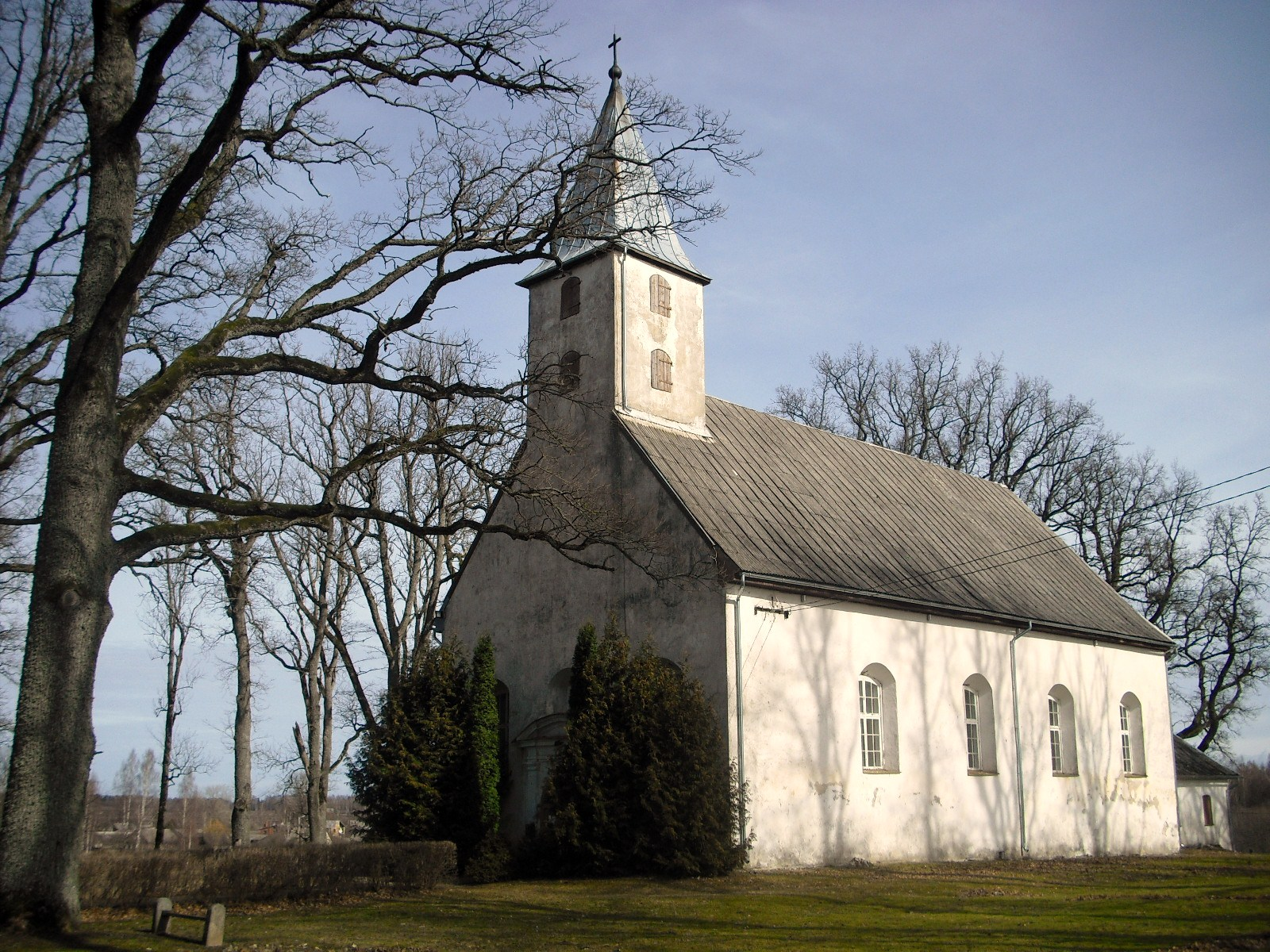 Evangelisch-lutherische Kirche in Mālpils / Lettland